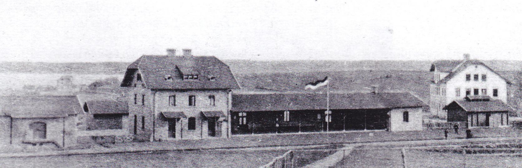 Bahnhof Schondorf auf einer Ansichtskarte aus dem Jahr 1907, links der Güterschuppen, in der Mitte das Empfangsgebäude mit halboffener Wartehalle, rechts die Bahnhofsrestauration